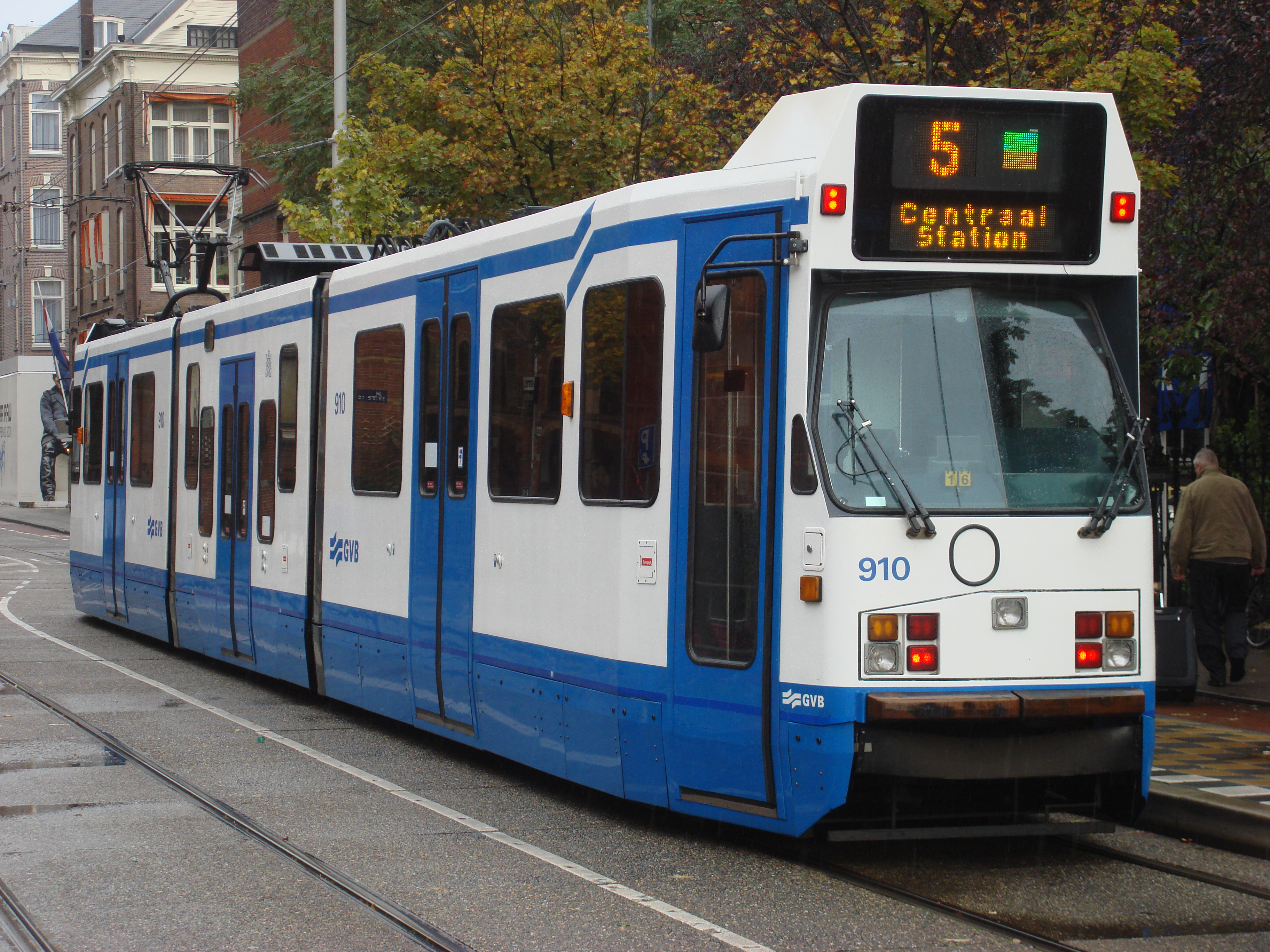 Gemeentelijk Vervoerbedrijf (GVB) tram 910